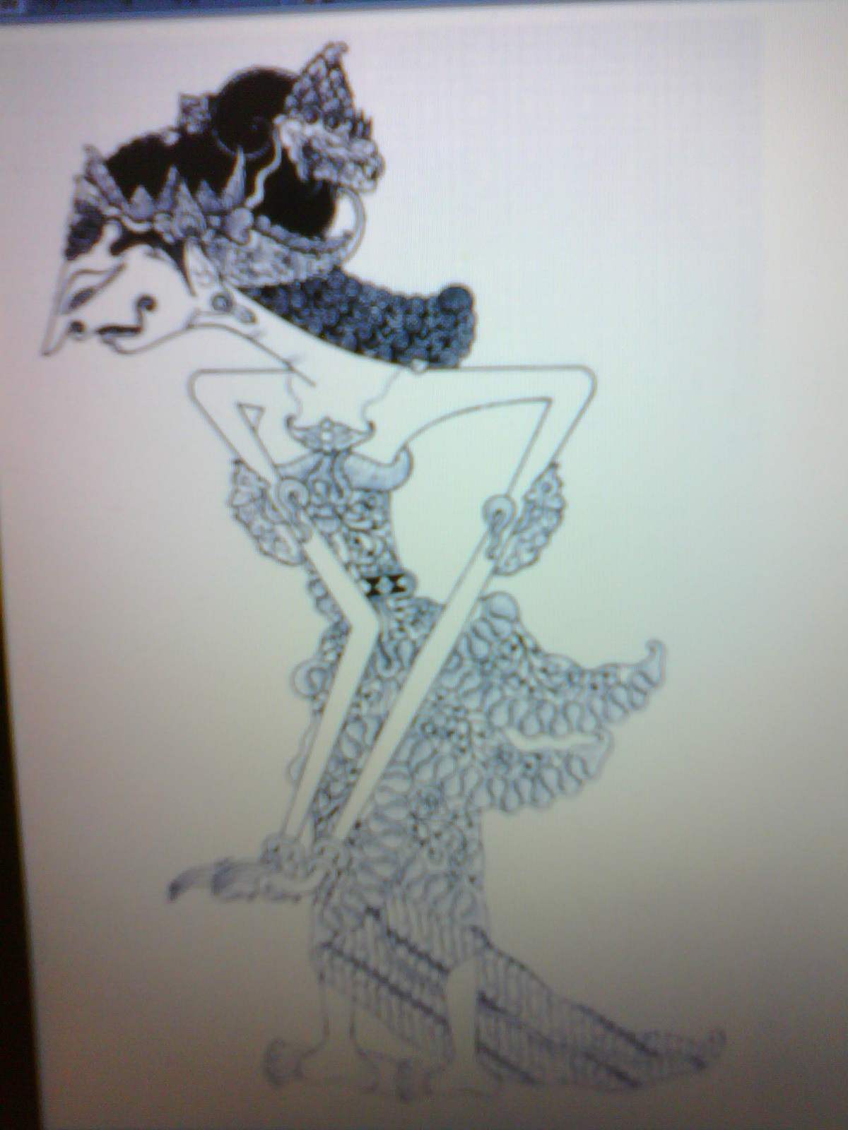 Basa Jawa: Dewi Anggraini, garwanipun Prabu Ekalaya.